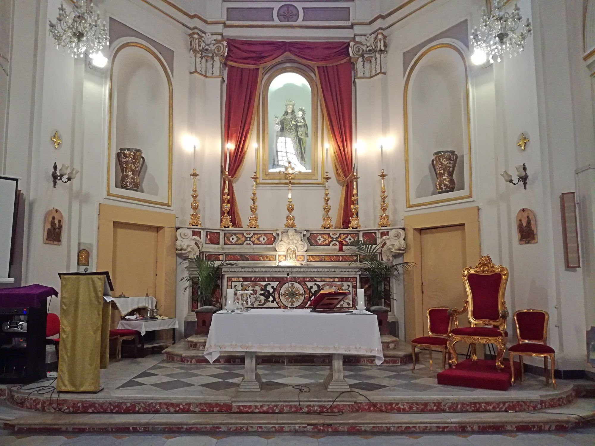 Chiesa di Santa Maria della Concordia (Napoli, altare maggiore)